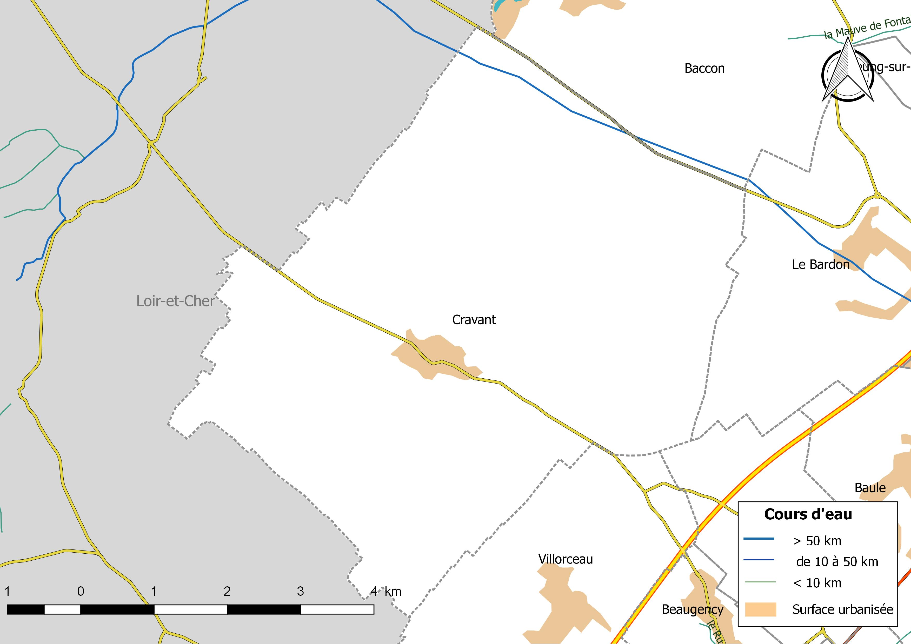 Carte du réseau hydrographique de la commune de Cravant (France).